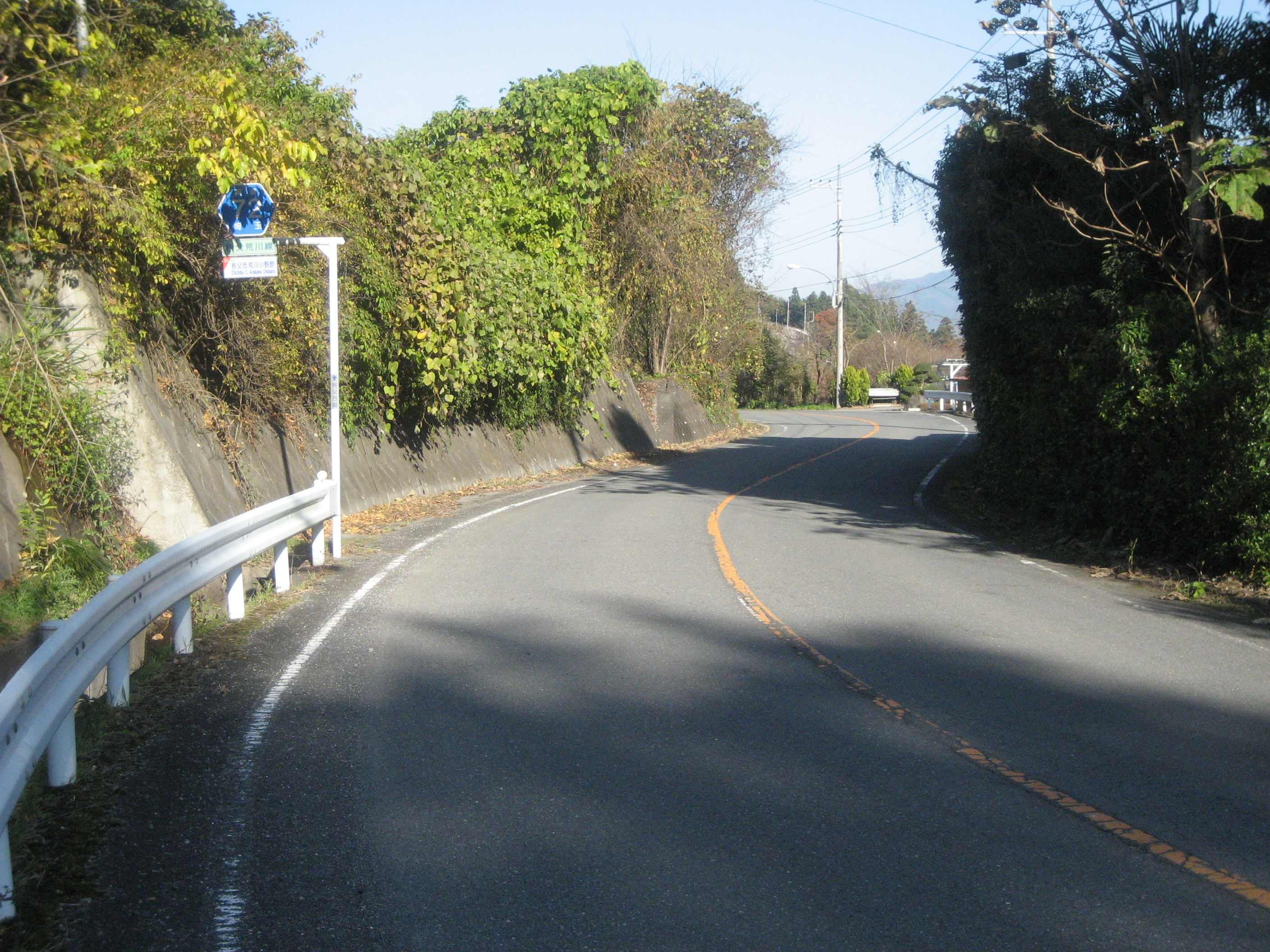 埼玉県道72号線秩父市内